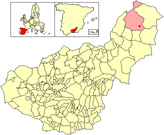 Situación de la localidad de Barrio Nuevo de San Clemente (en el municipio de Huéscar) respecto a la provincia de Granada, en España.